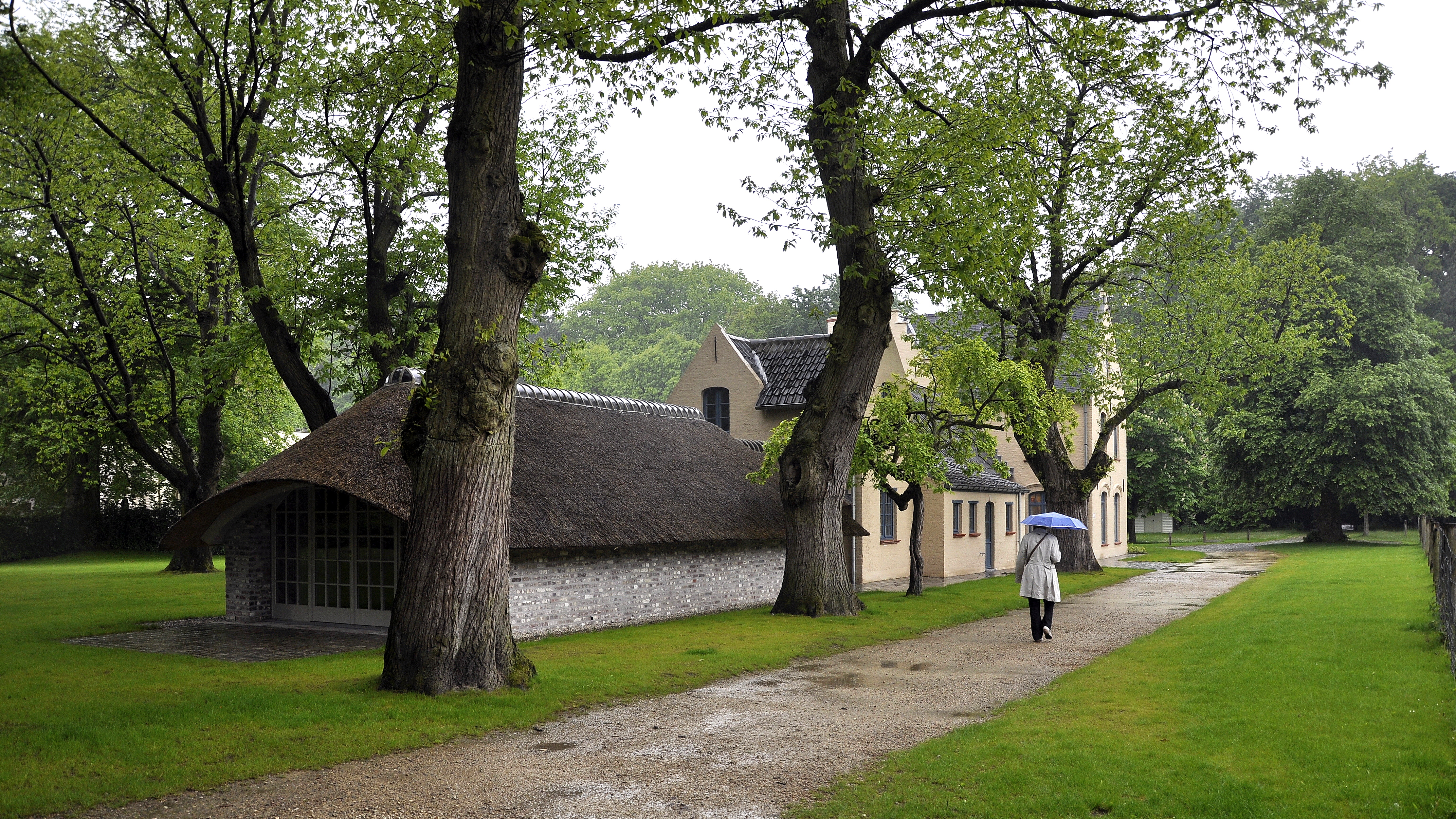 Het museum Gevaert-Minne te Sint-Martens-Latem, België